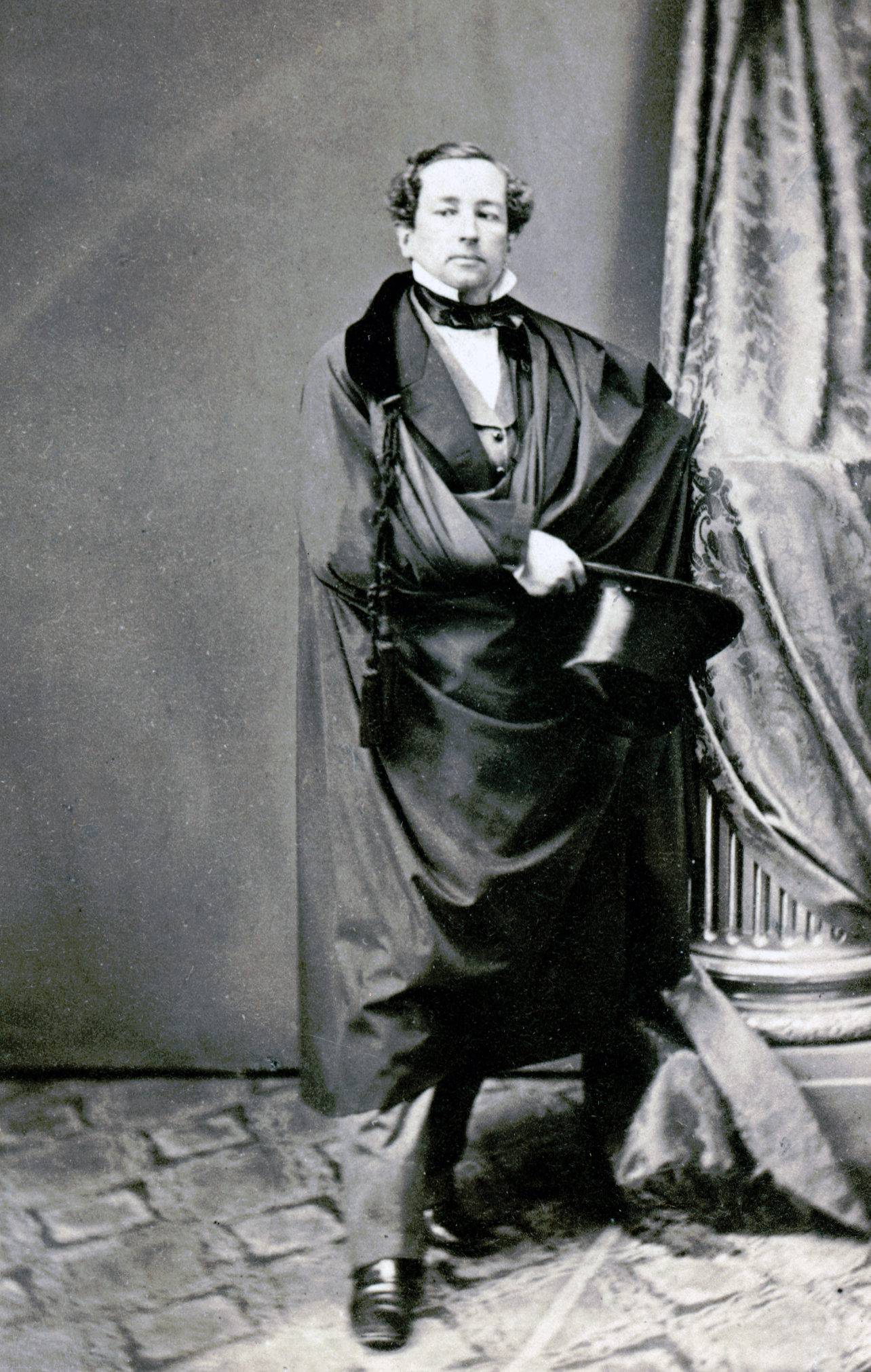 Oscar Andersson, teaterdirektör, 1861